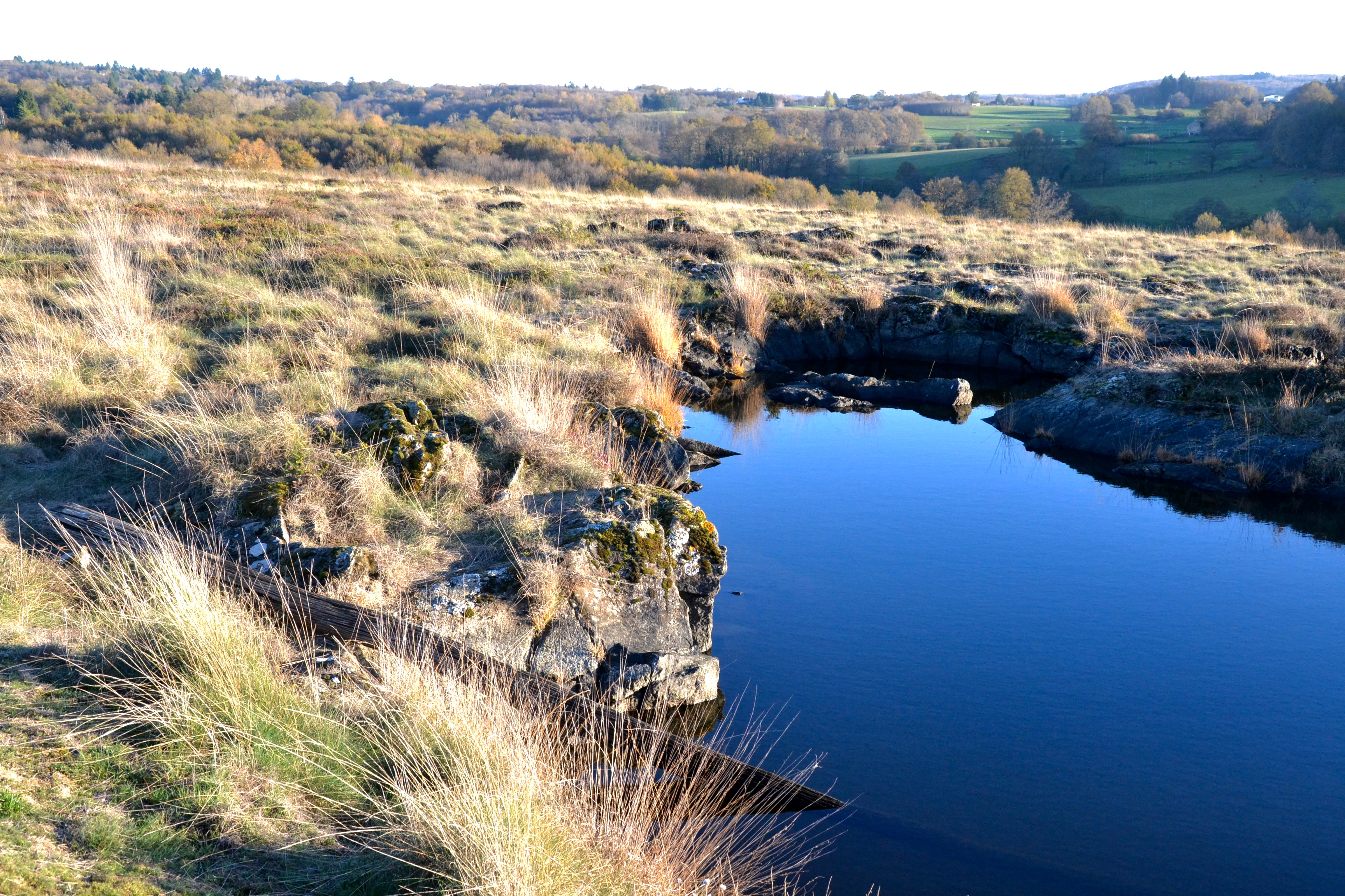 Paysage de la lande de Saint-Laurent (La Roche-l'Abeille, Haute-Vienne, France)